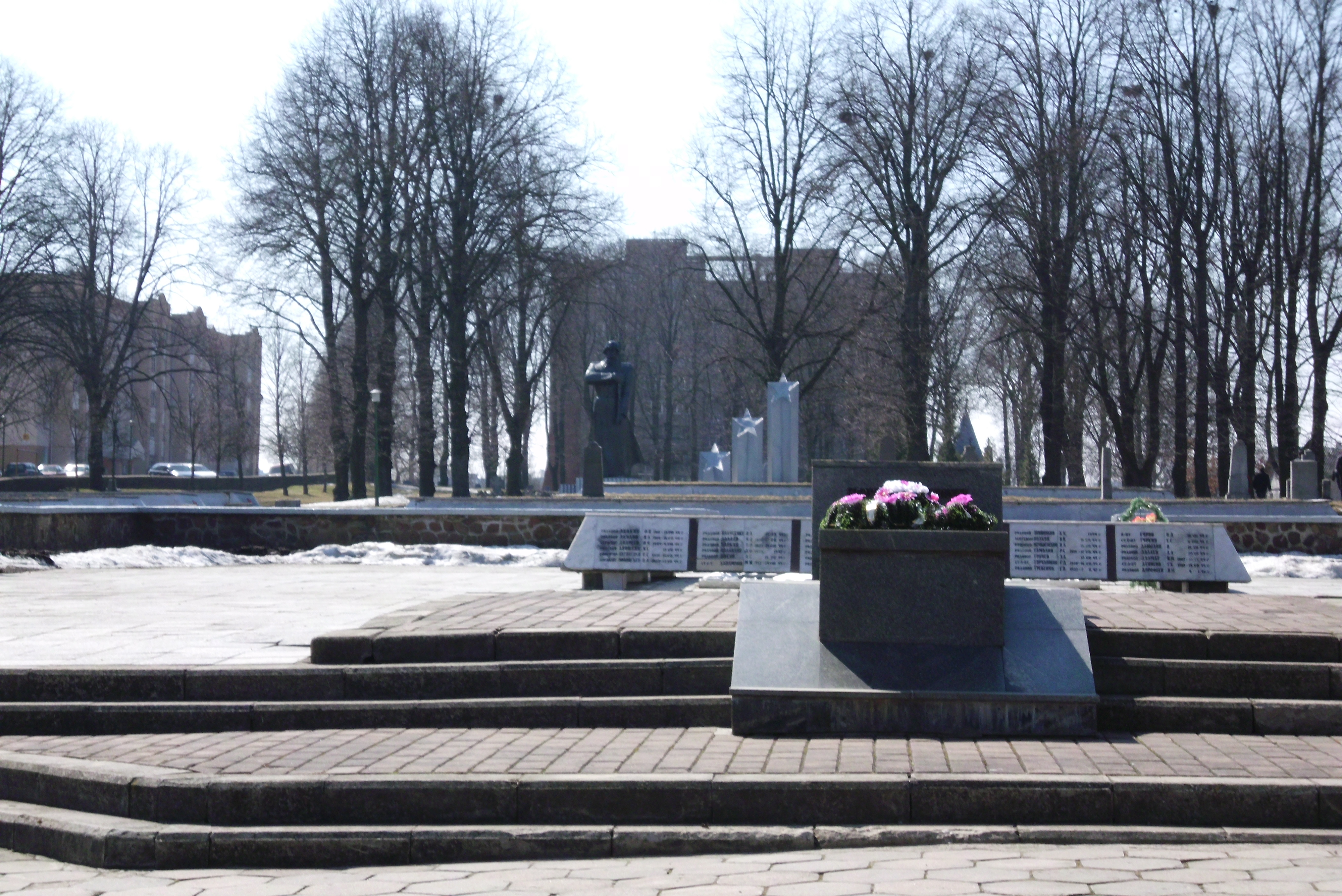 April 2013 Grodno